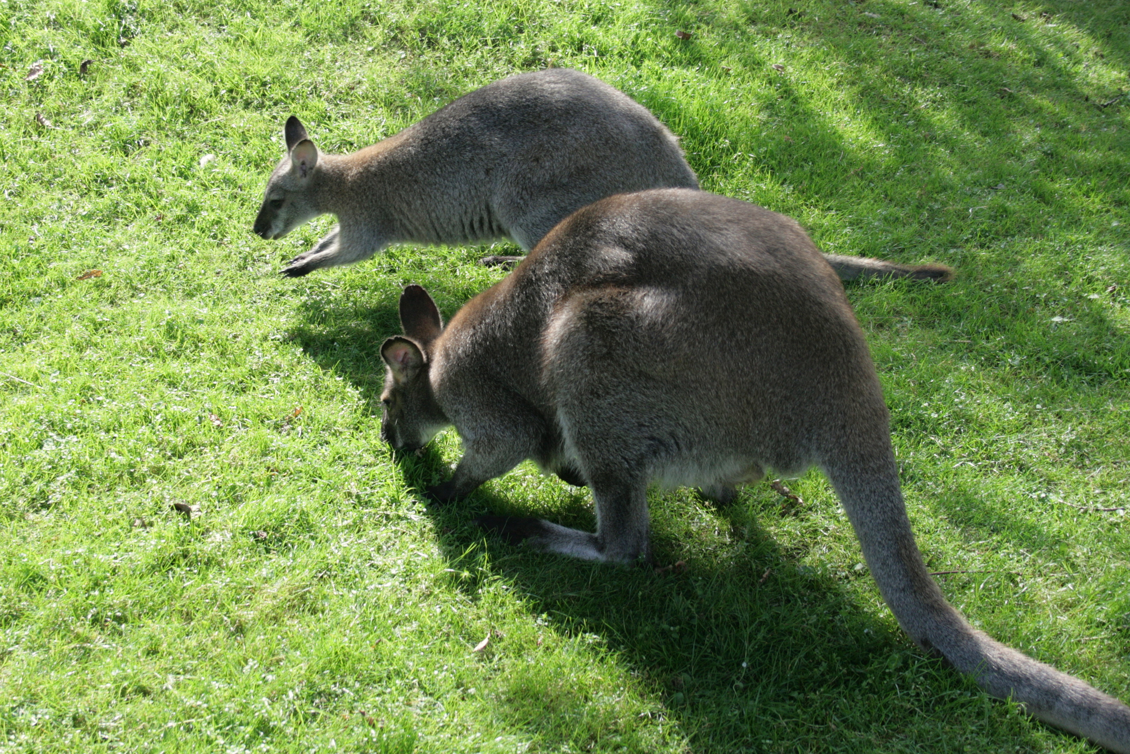 Rotnackenwallaby Macropus rufogriseus im Tierpark Fauna in Solingen-Gräfrath